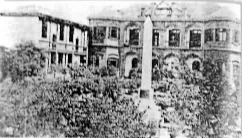 岳云中学长沙经武门故校址